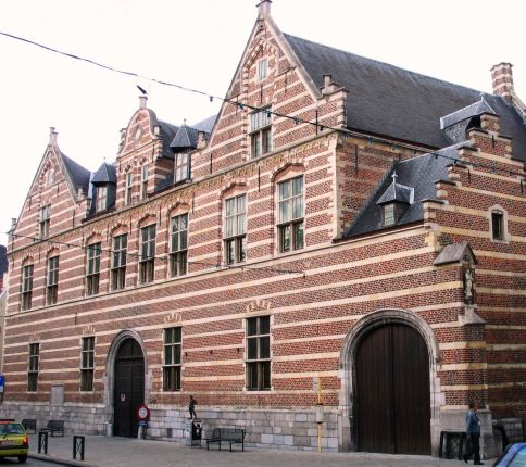 refugehuis Hasselt